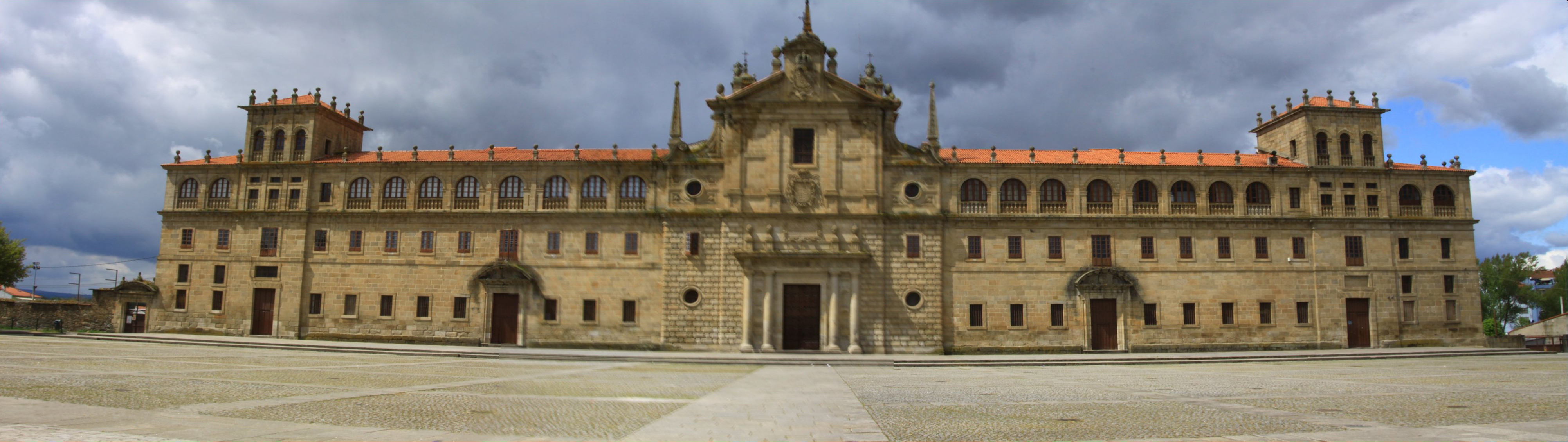 Colexio de Nosa Señora de Antigua, Monforte de Lemos